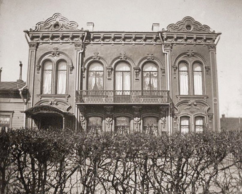 Особняк Сергеева - дворец рококо в Выборге. Конец 19 века